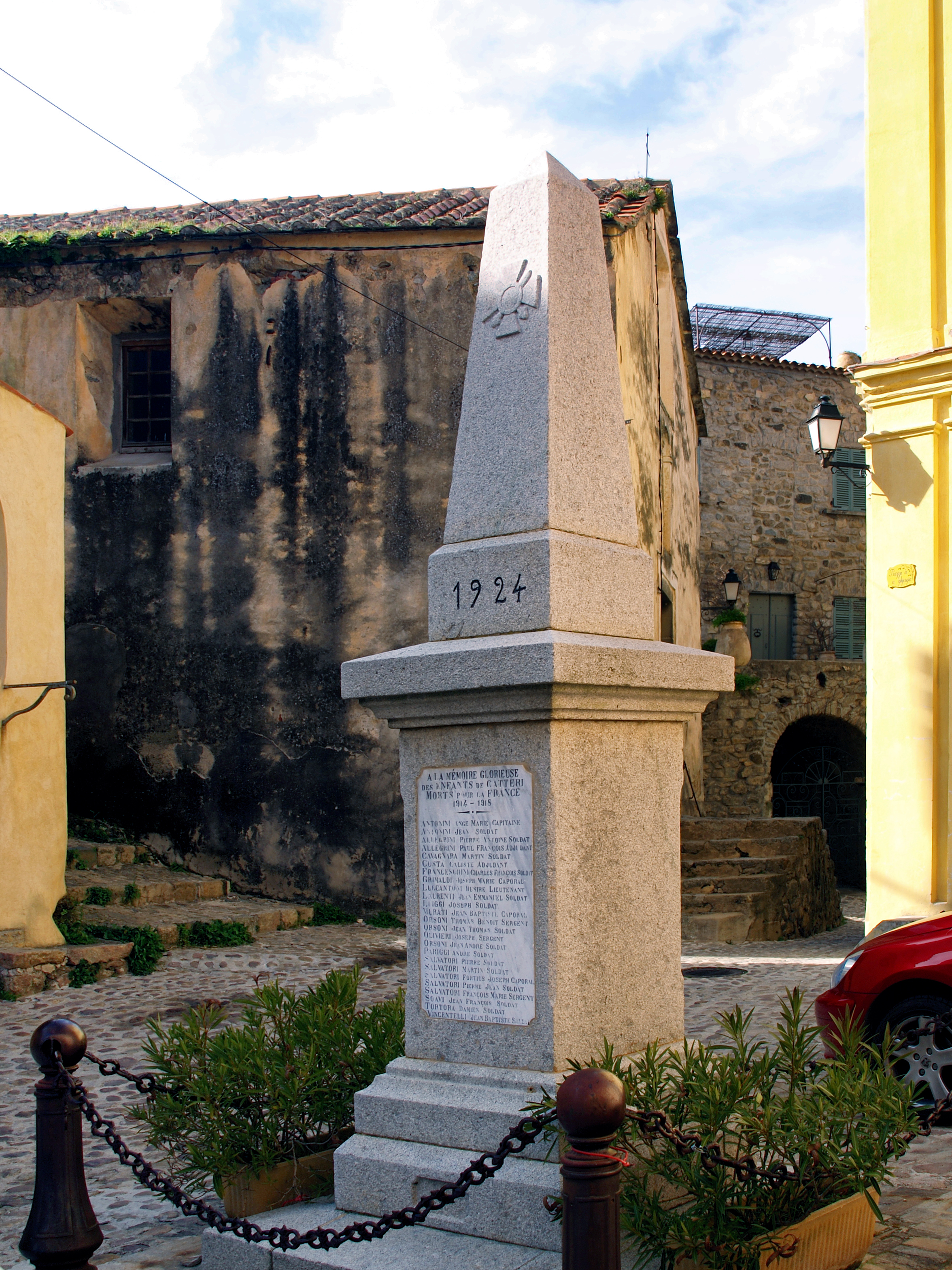 Cateri, Balagne (Haute-Corse) - Le monument aux morts érigé sur la placette à l'arrière de l'églie paroissiale de l'Assomption